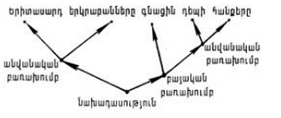 Գծագիր 1